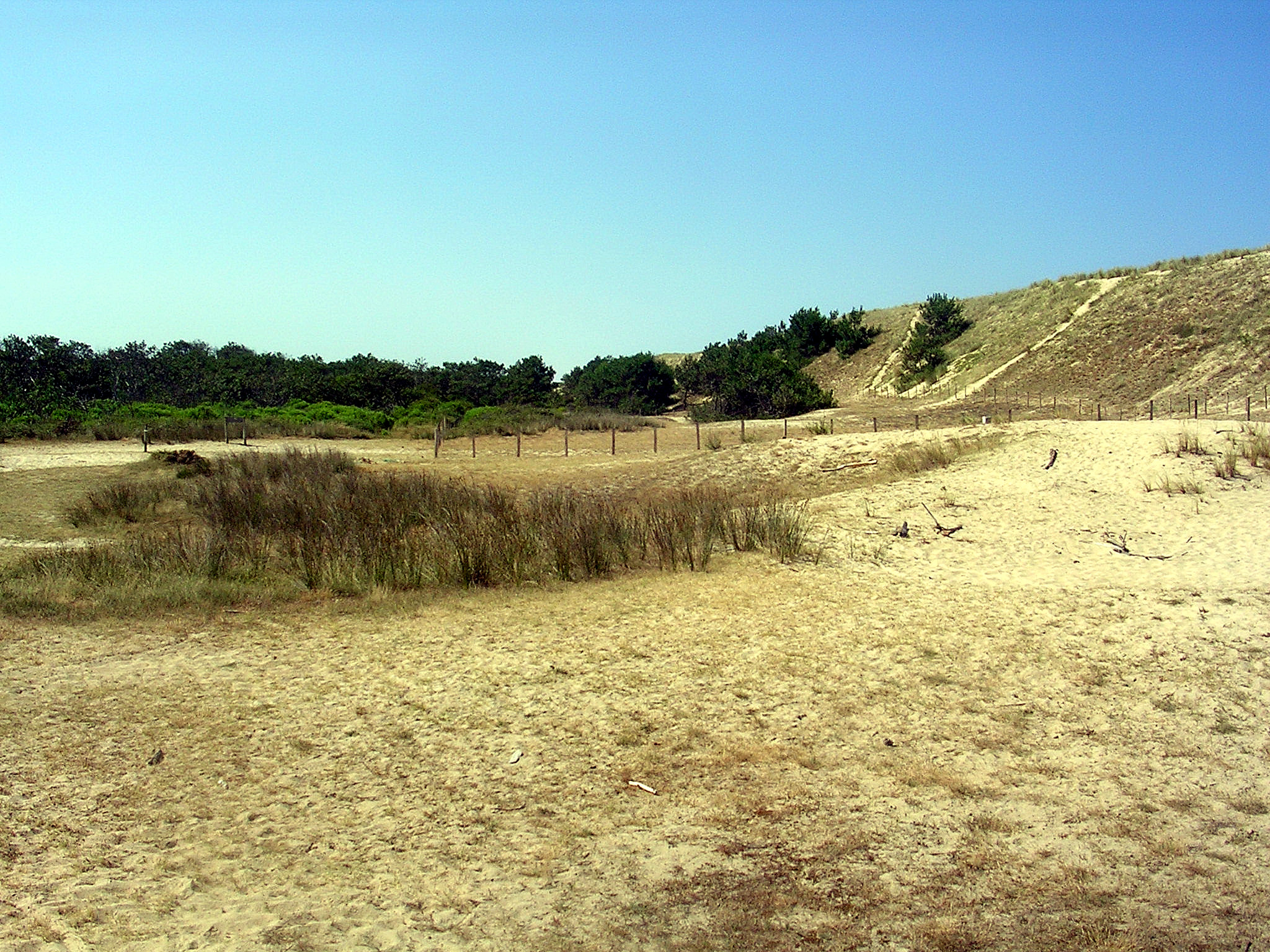 Lette de la Côte à Mimizan (Landes, France)